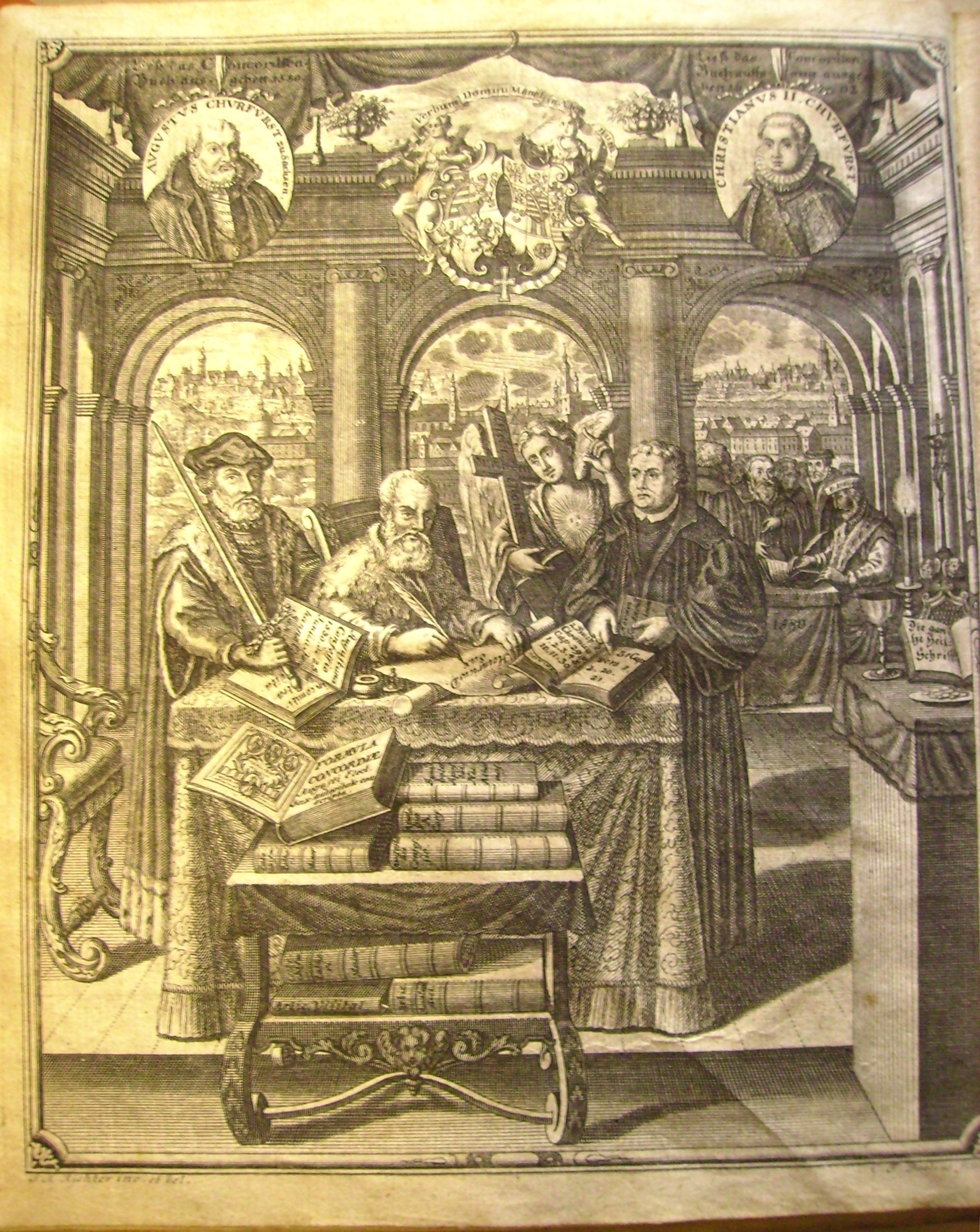 Stich aus dem Concordienbuch von Chr. Weiss 1739 mit Darstellung von Reformatoren